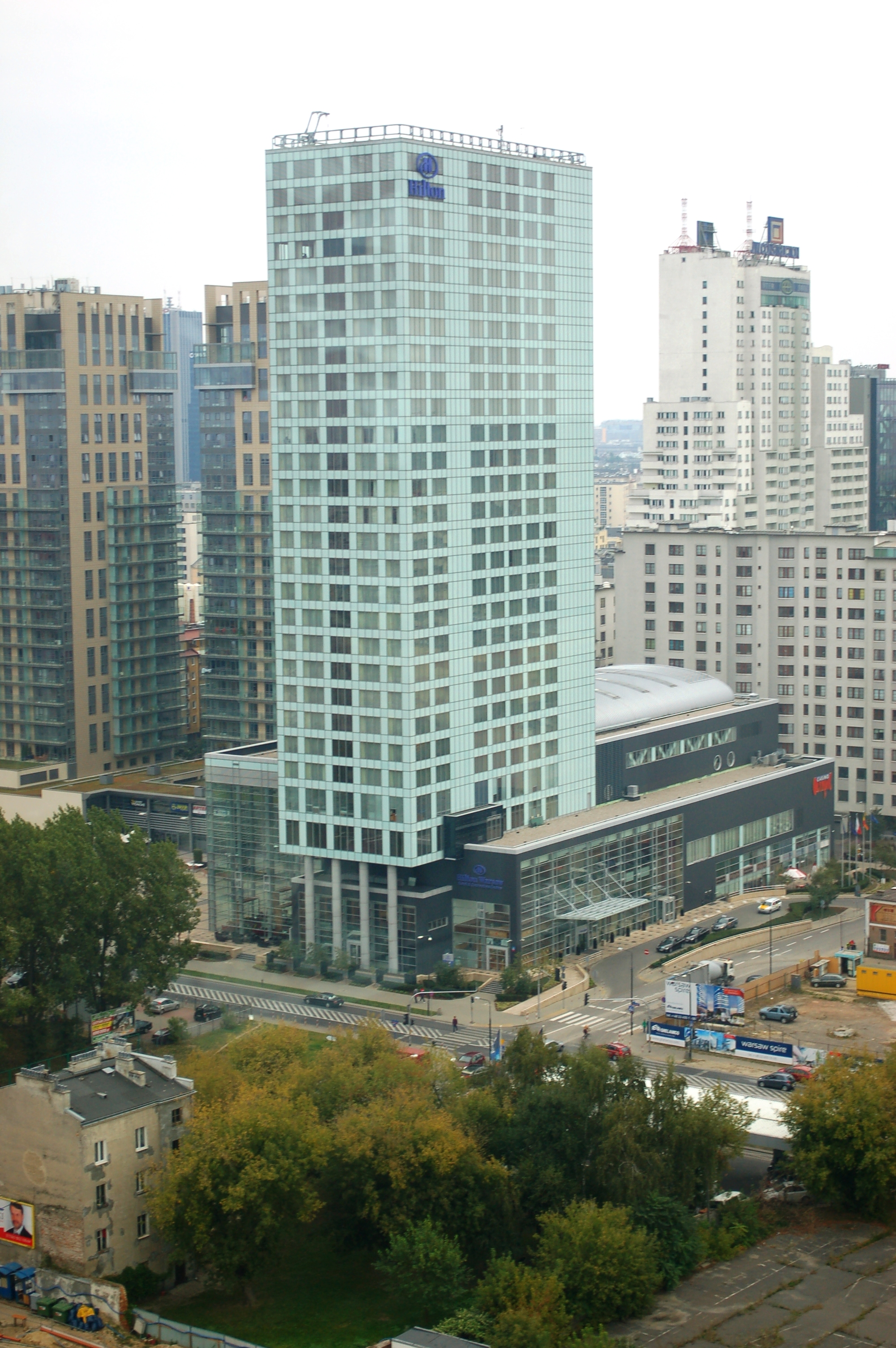 View from Warsaw Trade Tower, direction South-East